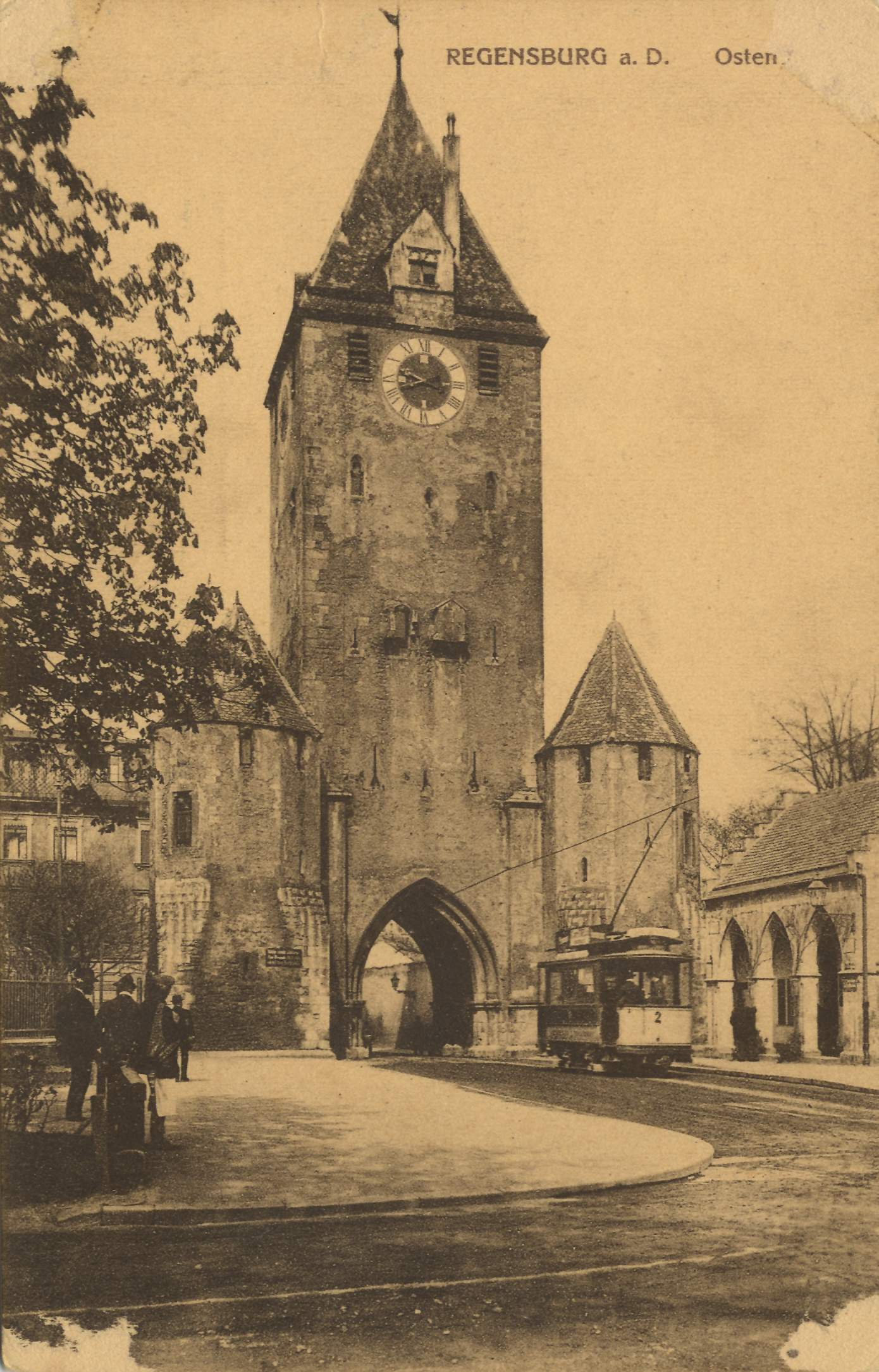 Osten